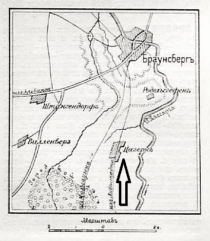 Zawierz (niem Zagern, pierwotnie Sawers) zaznaczony strzałką na mapie opublikowanej w 1911 w Военная энциклопедия (Сытин, 1911—1915)